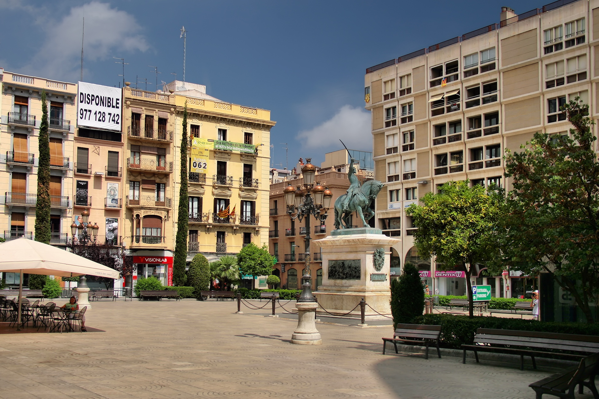 Plaça de Prim